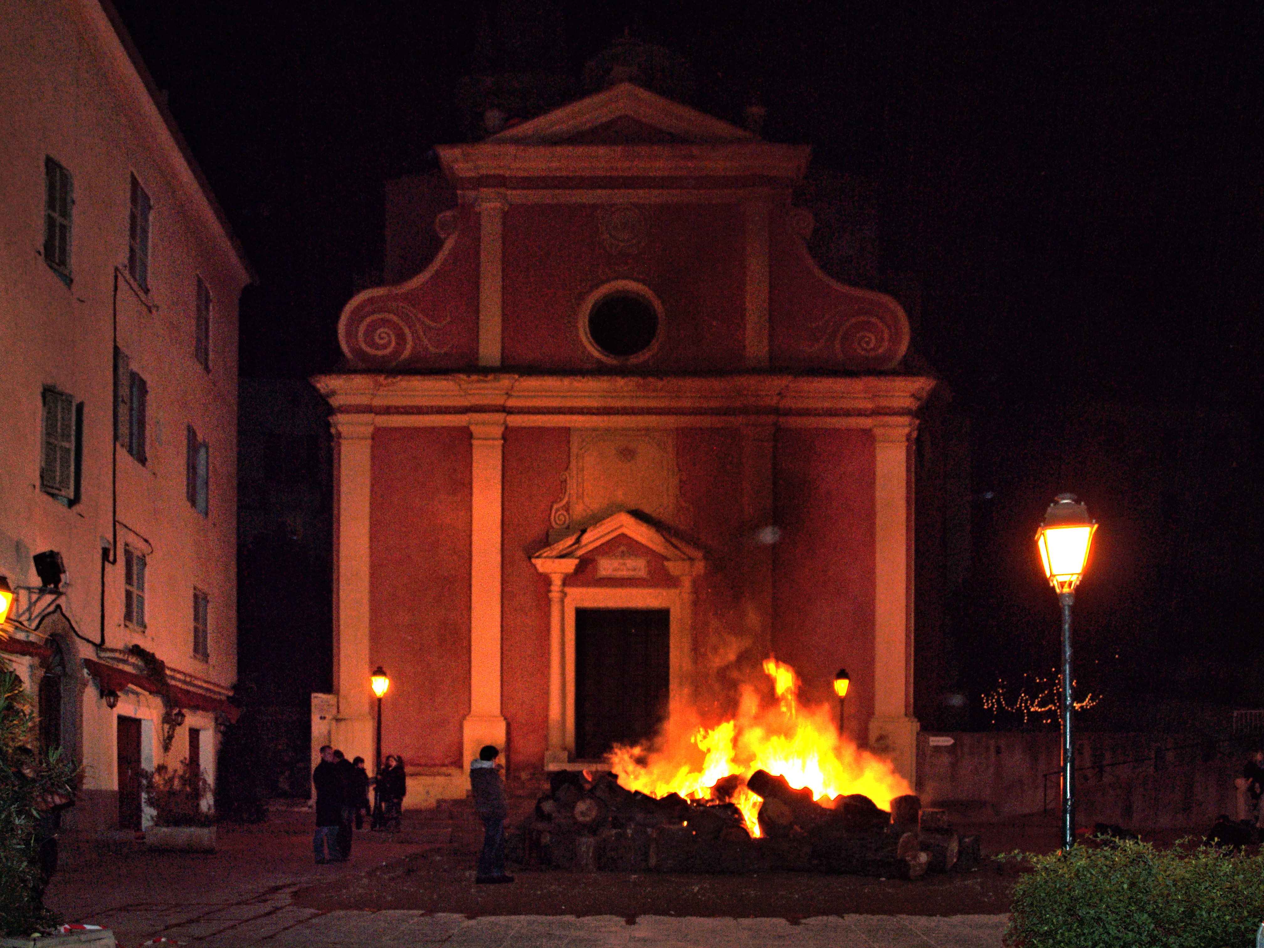 Calvi (Corse) - Feu de Noël (fucone) sur le parvis de l'église Sainte-Marie Majeure